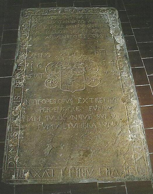 Sur celui-ci, y figure, à part les armoiries du Seigneur, une inscription latine, dont voici la teneur : HIC JACET GENEROSA PO TENSO D ALBERTUS DE GINGINS ECLEPAN ET VILLARII ET LUXURII DYNASTA CIVIS BERNENSIS CLERISSIM QUI FUERAT ANTIQUA NOBILI TAE ILLUSTRISSIMUS ARTE MARTE PROLE INGEITUS DONIS NATU RAE POLLENS BOMIS FORTU NAE AFLUENS OBIIT TAMEN ANNO DNI 1664 AETAT 73 INTER OPES OPUS EXTREMUM PERPENDERE FUNUS NAM QUODCUMQUE SUMUS FUMUS ET UMBRA SUMUS « Ici repose généreux et puissant Albert de Gingins Éclépens et Villars-Lussery, seigneur, citoyen bernois. Celui qui avait été le plus éclatant dans le métier de la guerre, avec son antique grandeur, s’imposant à la postérité, pourvu de nombreux dons de la nature, est mort pourtant en l’année du Seigneur 1664, à l’âge de 73 ans. Lorsqu’on est dans l’abondance, l’ultime tâche est de prévoir qu’on va mourir. En effet tout ce que nous sommes, nous sommes fumée et ombre ».